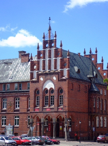 Kętrzyn, Plac Grunwaldzki 1 - starostwo powiatowe, 1893-1894 (zabytek nr A-2180 i 1553 z 1.09.1987).